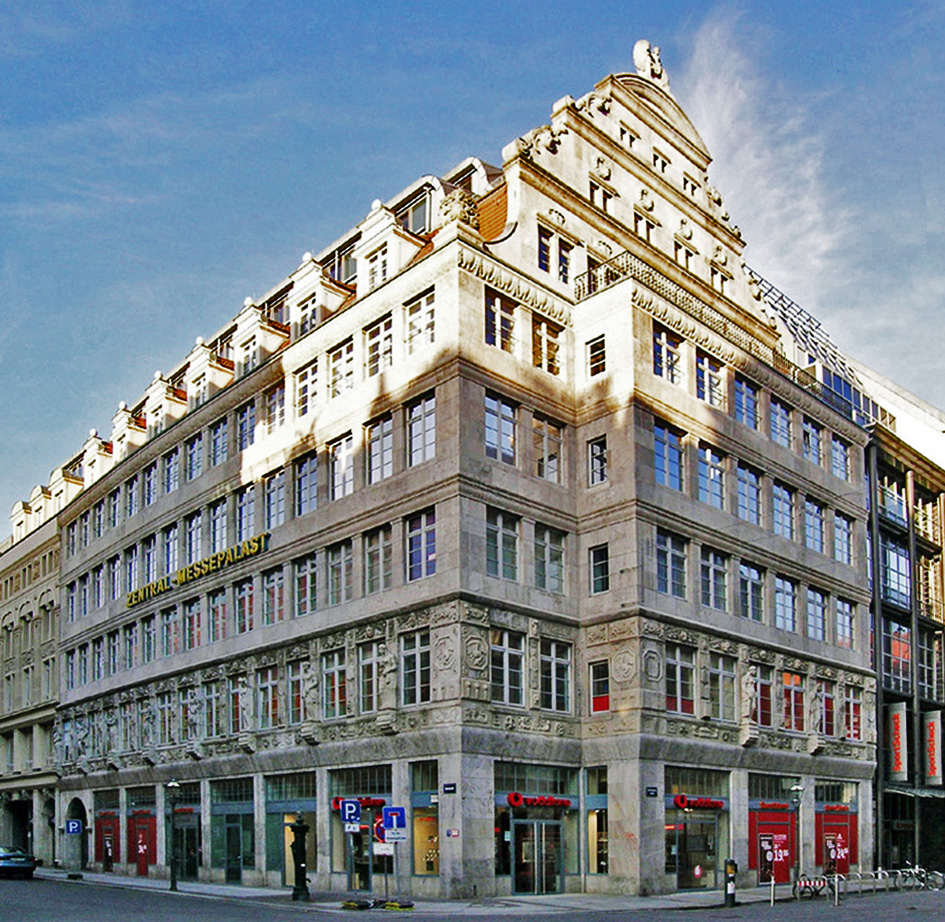 Bau der wilhelminischen Zeit Ecke Neumarkt/ Grimmaische Straße.